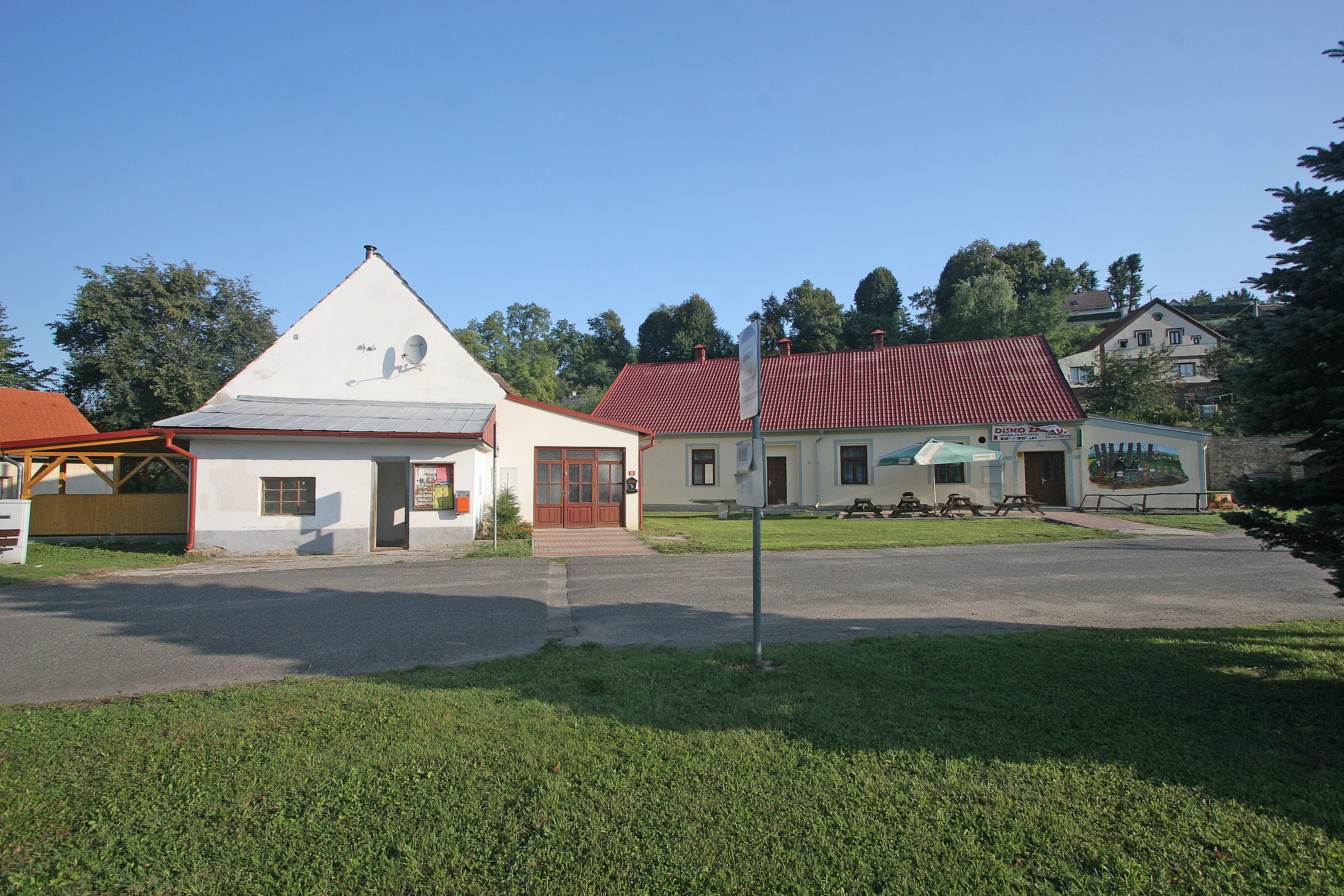 Velký Hubenov hospoda